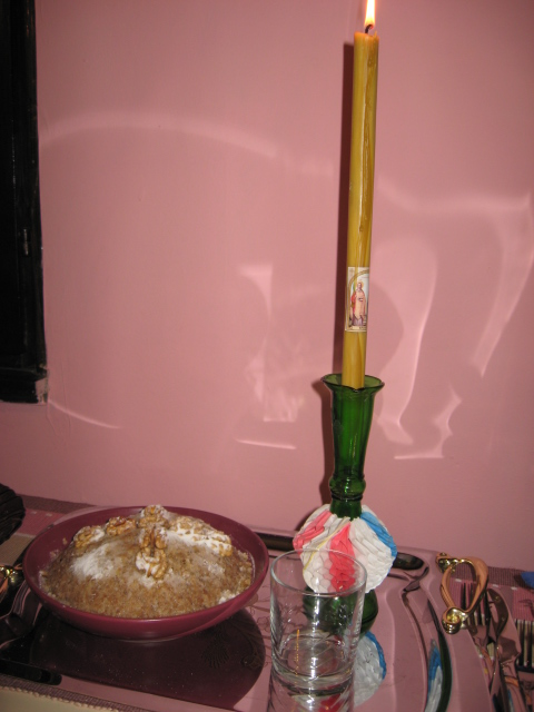 Славско жито и свећа